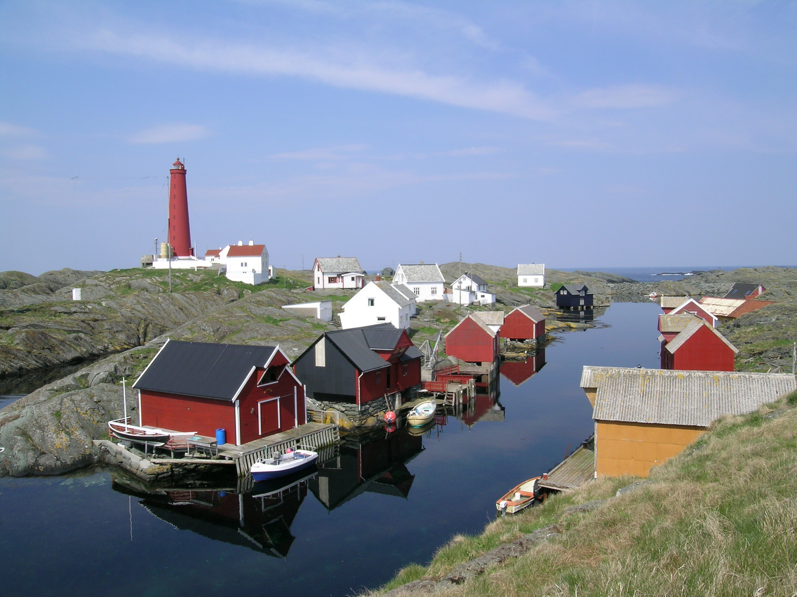 Utvær fyr eller Utvær fyrstasjon ligger i Solund kommune i Sogn og Fjordane. Utvær er det vestligste punktet i Norge, og ligger på øygruppa Utvær, et fredet naturreservat. Fyret har et rødt fyrtårn med lyskilde 45 m.o.h.